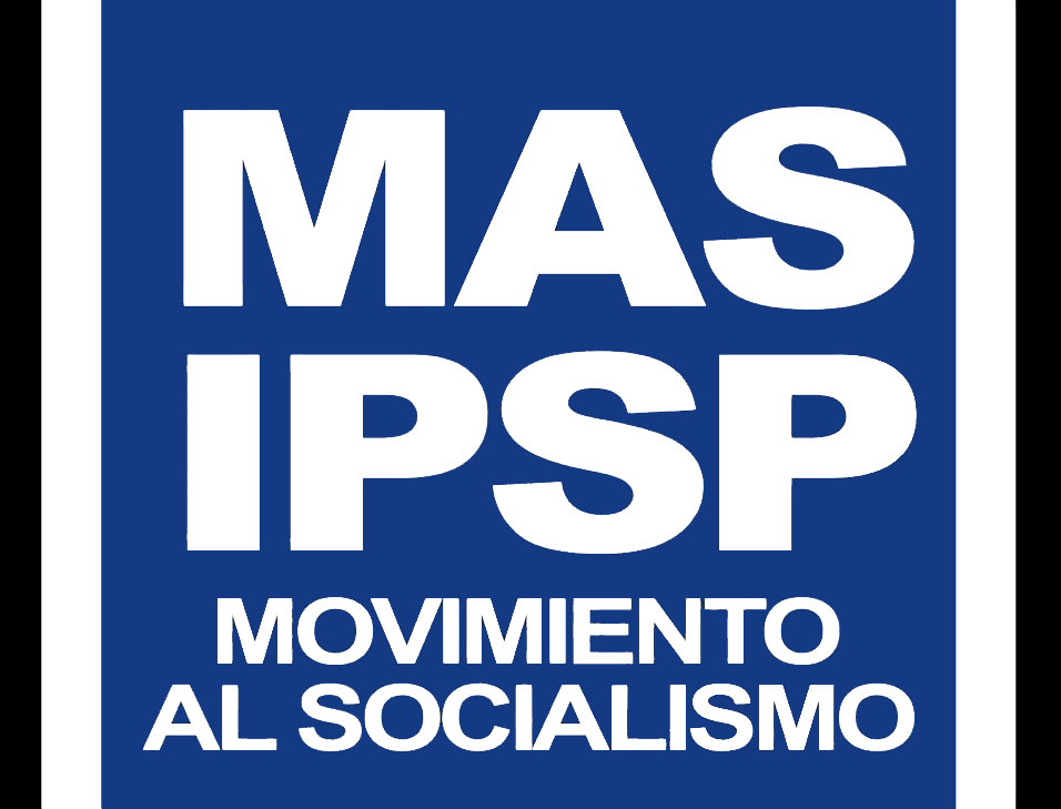 Reproducción del emblema del partido político boliviano Movimiento al Socialismo